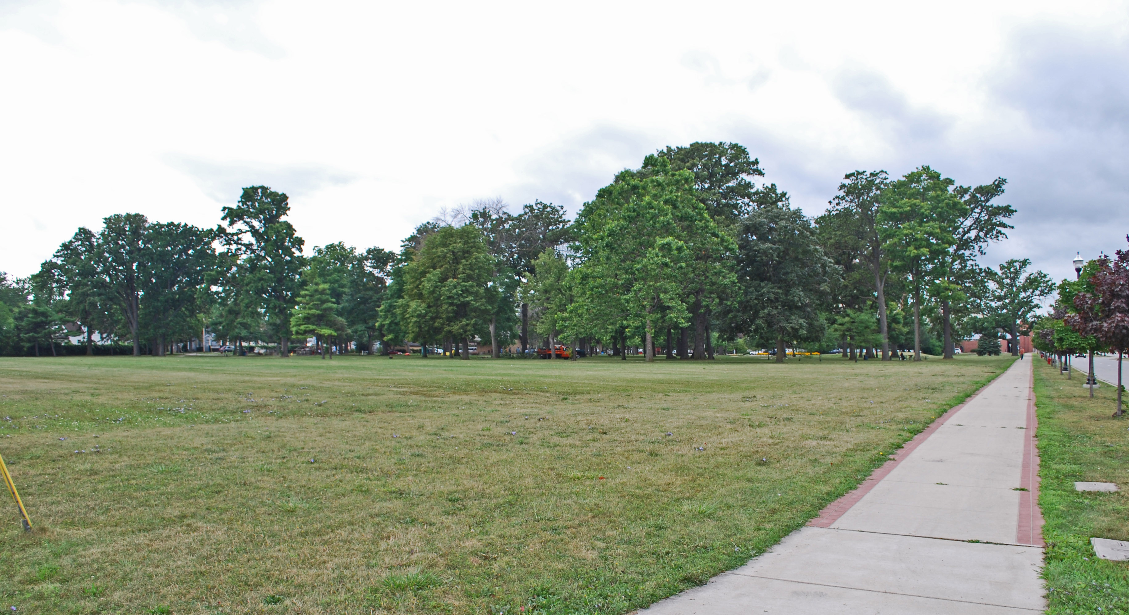 Bliss Park, Saginaw MI